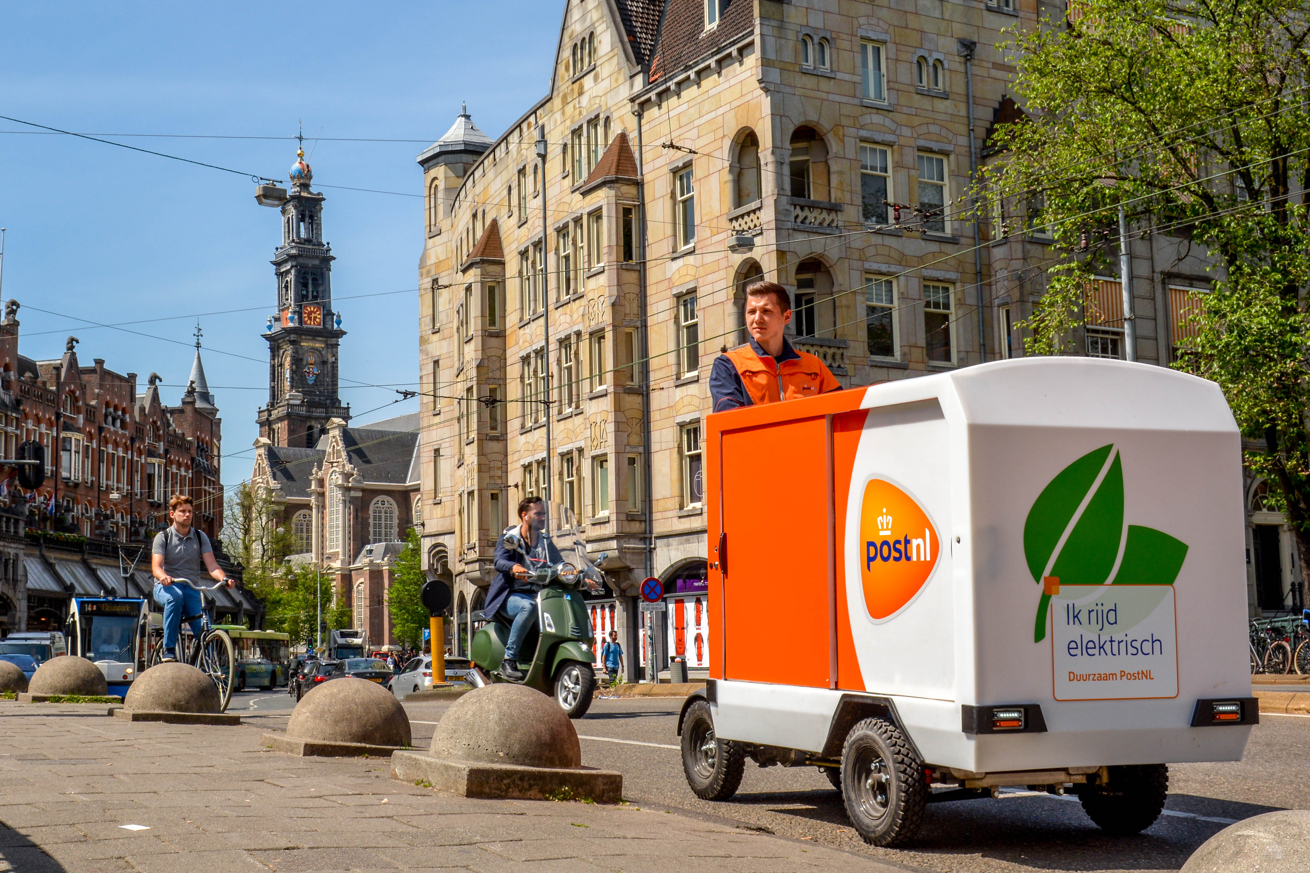 PostNL Stint